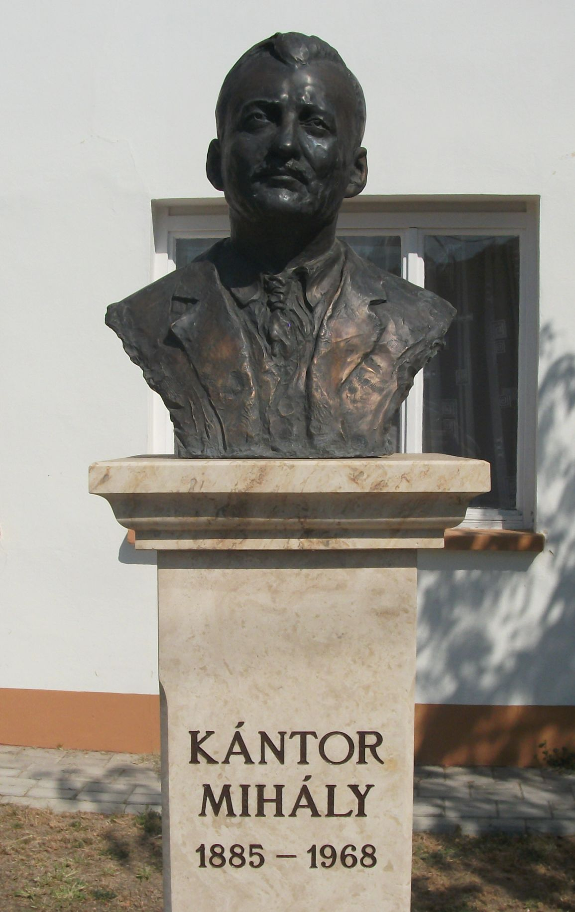 Kántor Mihály bronz mellszobra Cigándon, a róla elnevezett általános iskola előtt. Czigándi Varga Saándor alkotását 2012. augusztus 19-én avatták fel.